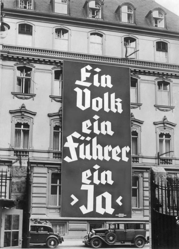 Wahlplakat der NSDAP zur Reichstagswahl ADN-ZB Im faschistischen Deutschland 1933 Wahlplakat der NSDAP am "Adolf-Hitler-Haus" in der Voßstraße zu den Reichstagswahlen am 12.11.1933 38791-33 [Berlin, Voßstraße.- Wahlplakat der NSDAP zur Reichstagswahl ("Ein Volk, ein Führer, ein Ja")]